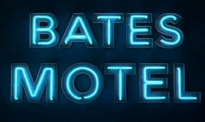 Logo de la série télévisée Bates Motel